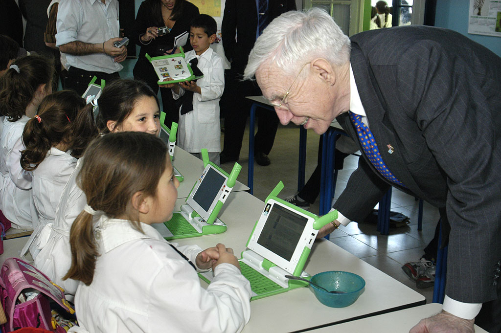 Niños del departamento de Florida recibiendo sus computadoras gracias al programa "One Laptop per child"